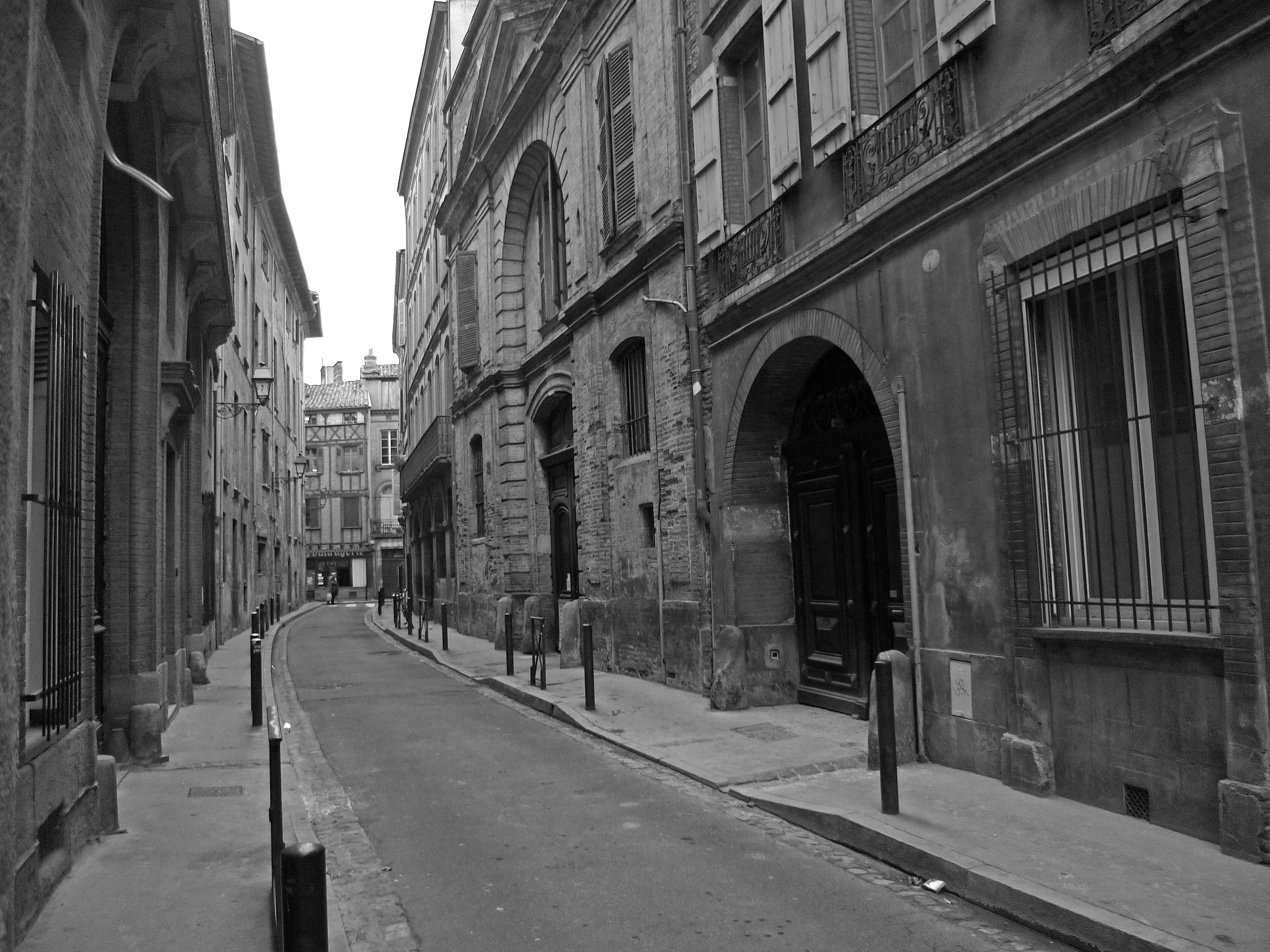 La rue Velane à Toulouse (Haute-Garonne, France).